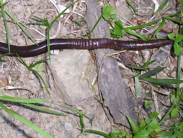 Microchaetus skeadi